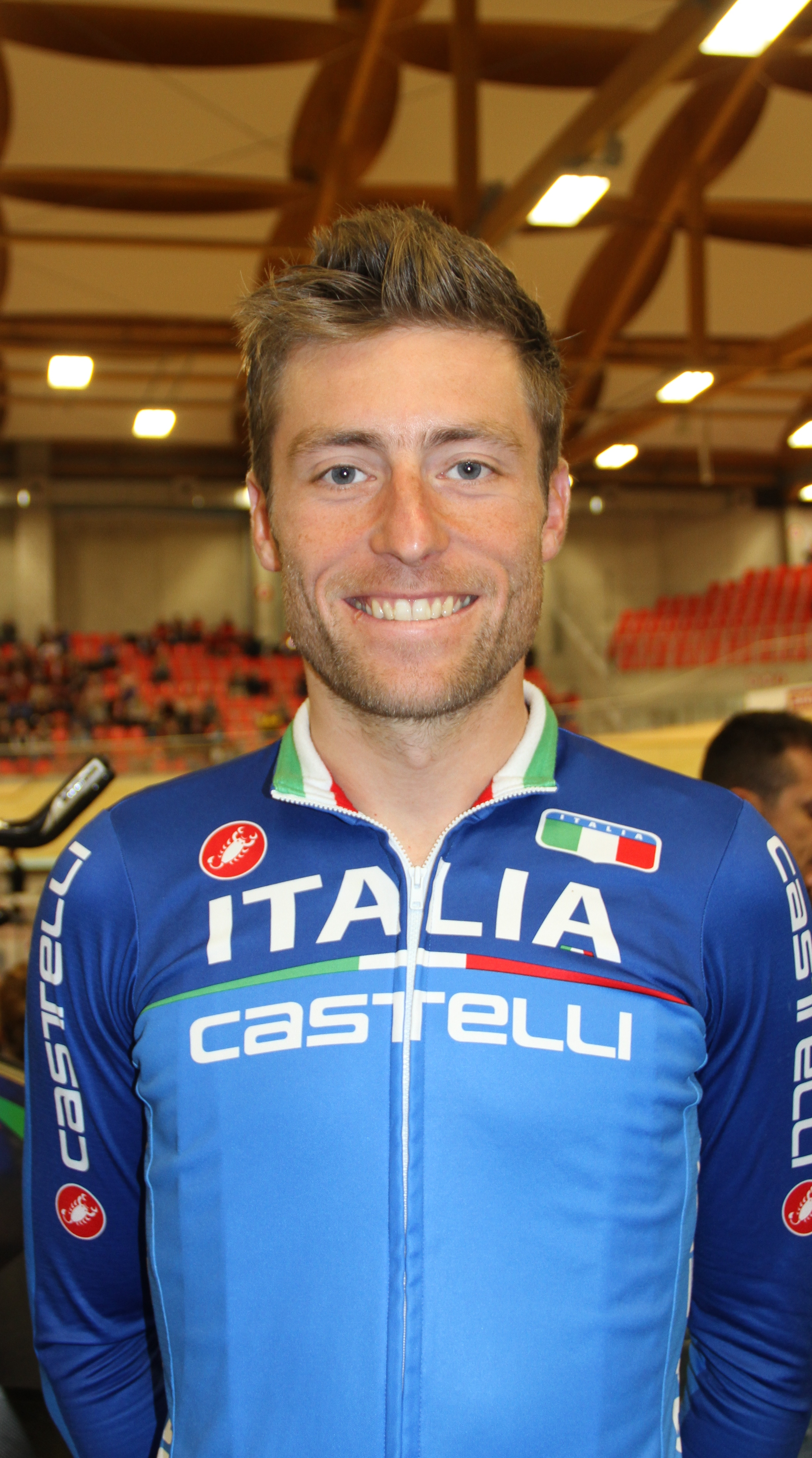 Alex Buttazzoni, italienischer Radsportler The making of this document was supported by the Community-Budget of Wikimedia Germany.